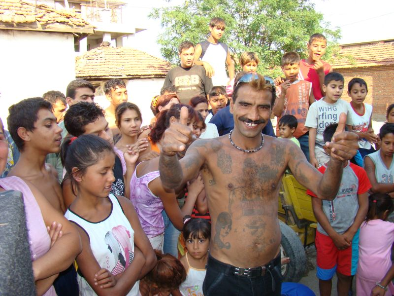 Gipsy people in "Nadezhda", Sliven, Bulgaria